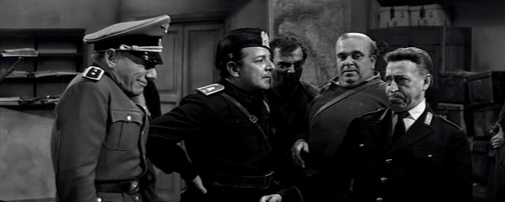 Screenshot del film I due marescialli (1961) diretto da Sergio Corbucci